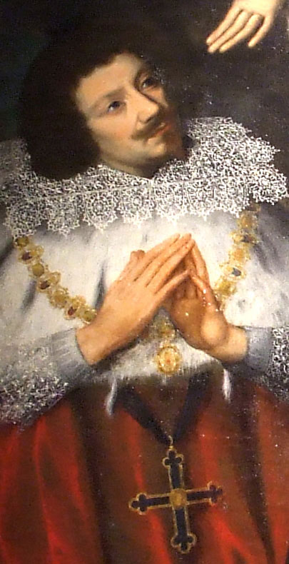 San Romualdo offre il modello della chiesa dei Camaldolesi nel Bosco della Fontana a Dio Padre, alla Vergine e a Gesù bambino, alla presenza di Carlo I e Carlo II Gonzaga Nevers